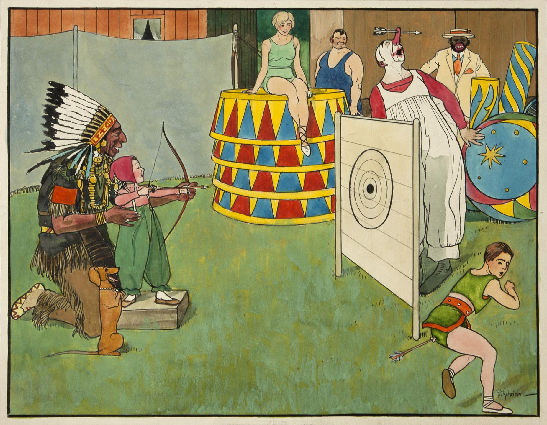 Kulihrášek ("Kleiner Schlingel") als Bogenschütze, rechts unten signiert: Art. Scheiner, kombinierte Technik/Papier, 24 x 31 cm